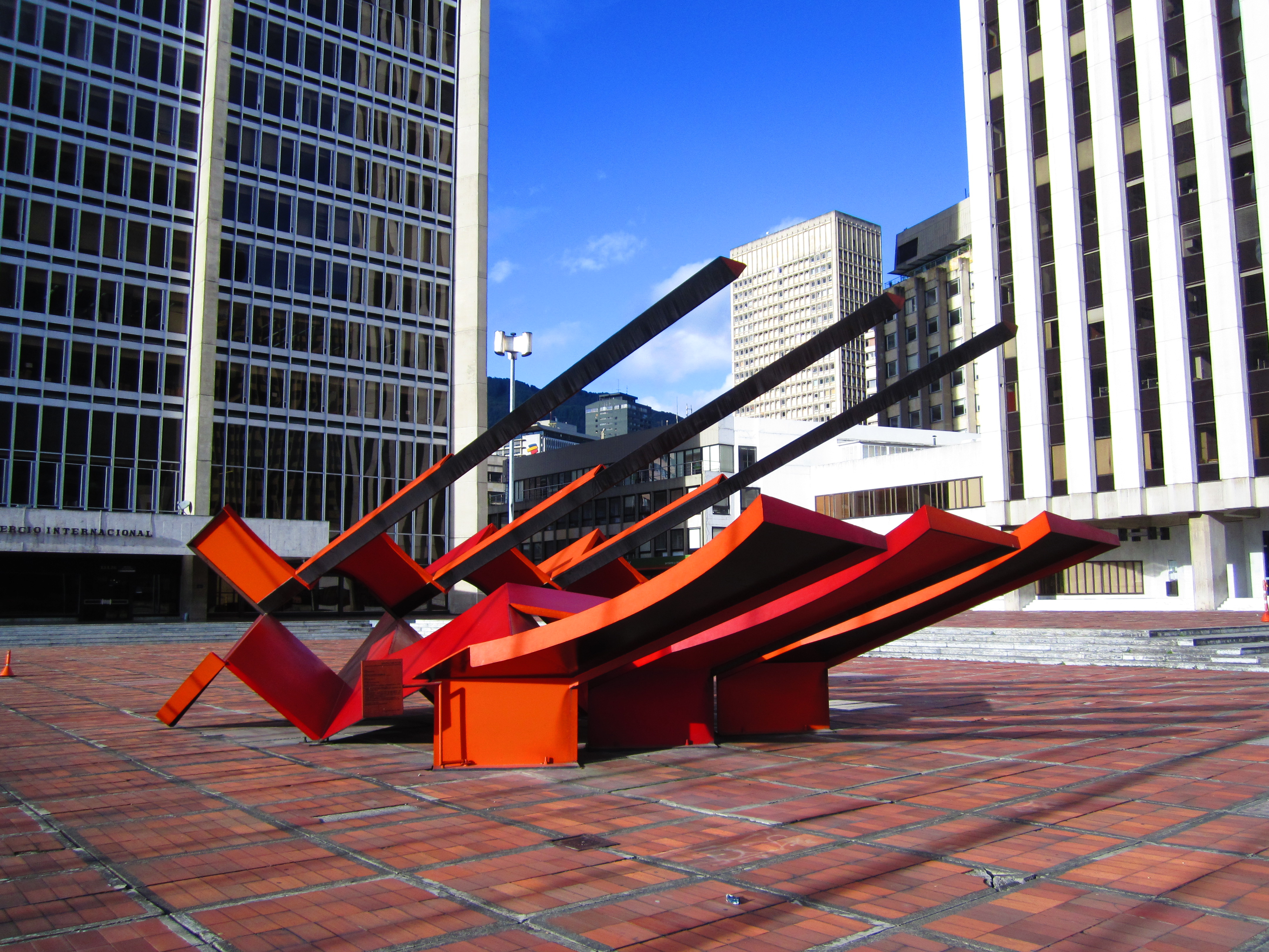 Bogotá, escultura "Nave Espacial" de Eduardo Ramírez Villamizar, Centro Internacional, localidad de Santa Fe .